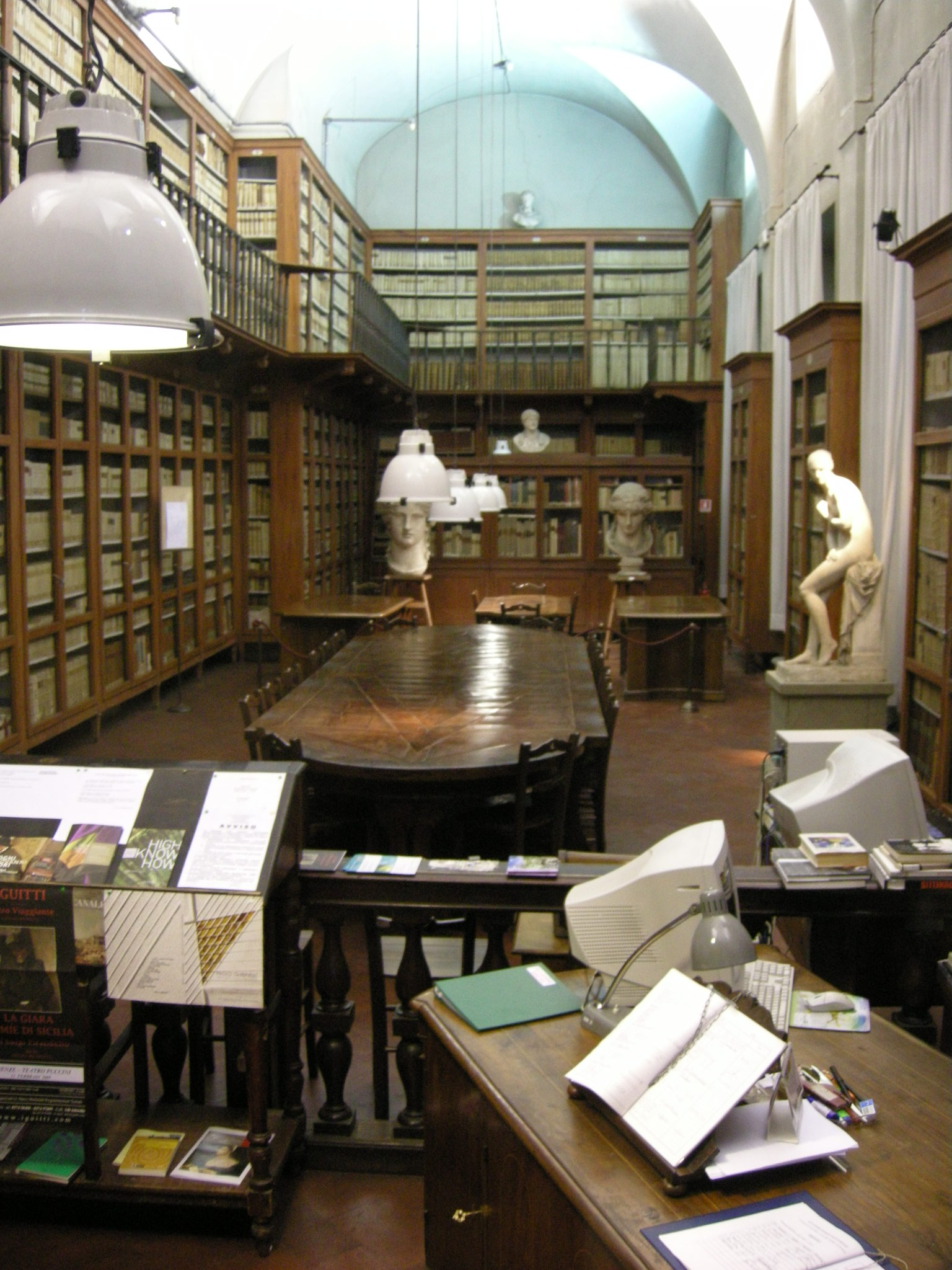 Accademia di firenze, biblioteca 01